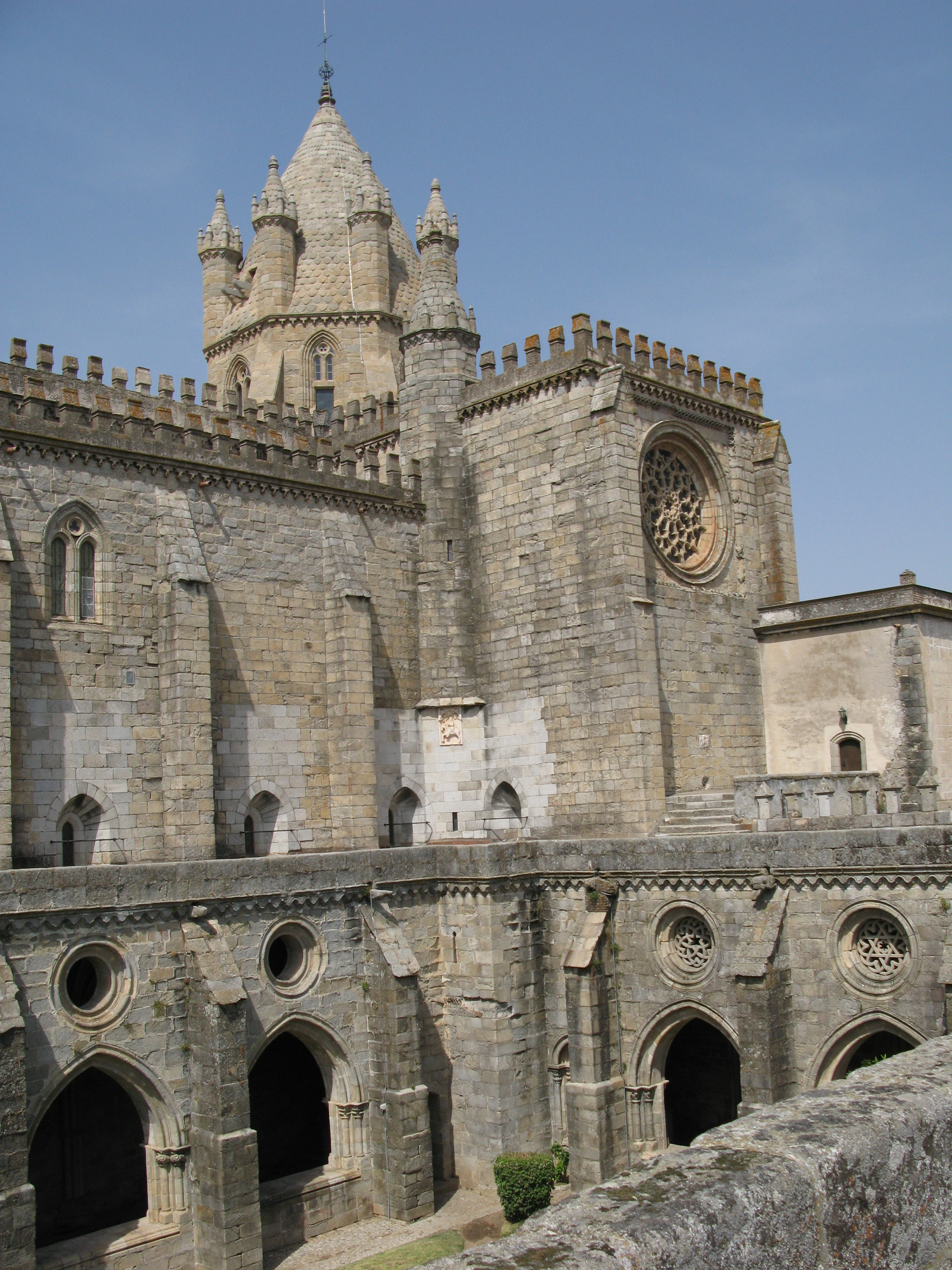 Évora Cathedral, Portugal